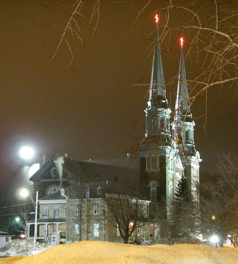 Notre-Dame de l'Annonciation